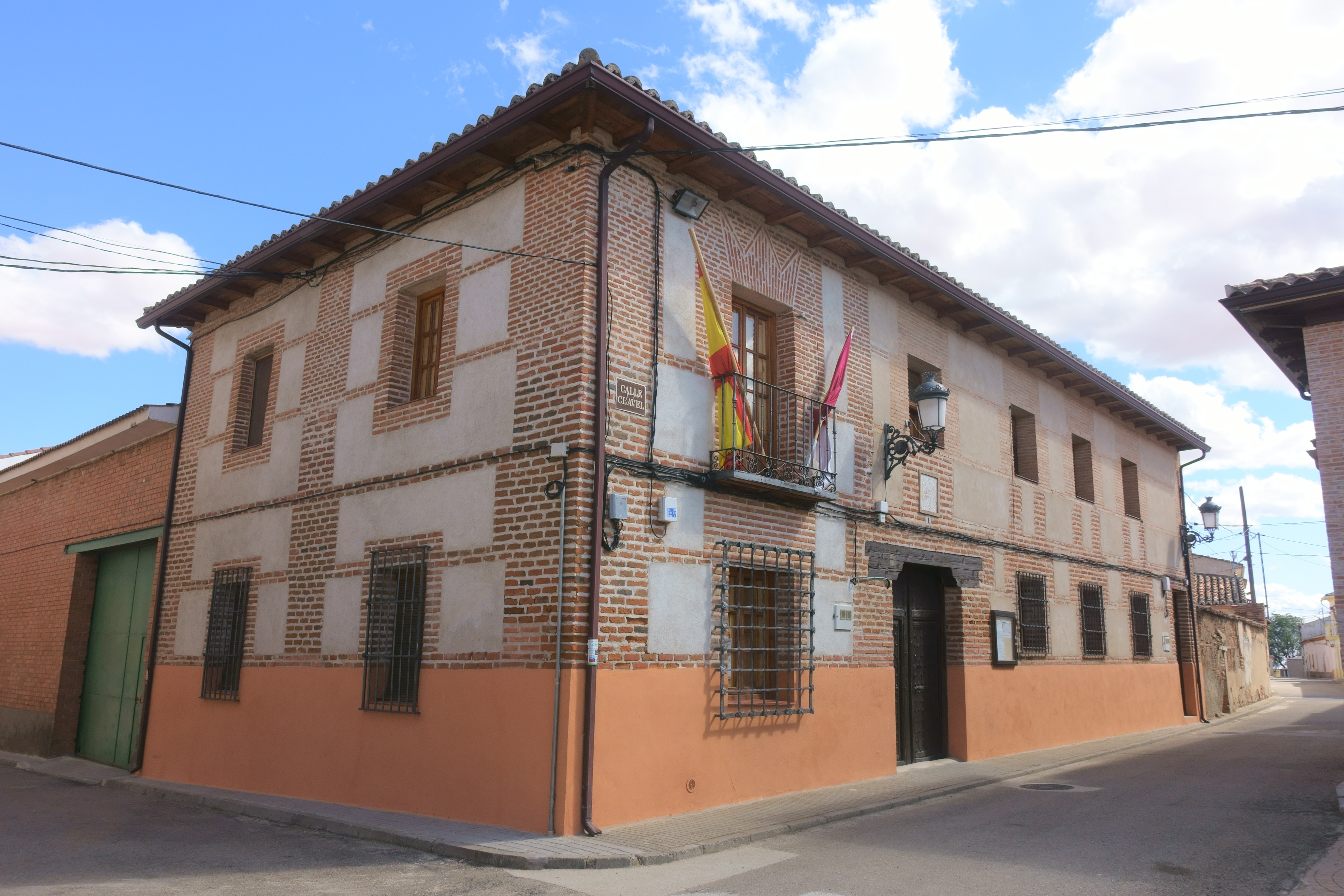 Casa consistorial de Viñuelas (Guadalajara, España).